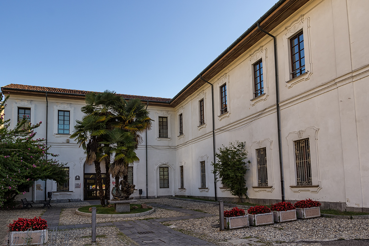 Palazzo Marliani-Cicogna This is a photo of a monument which is part of cultural heritage of Italy.